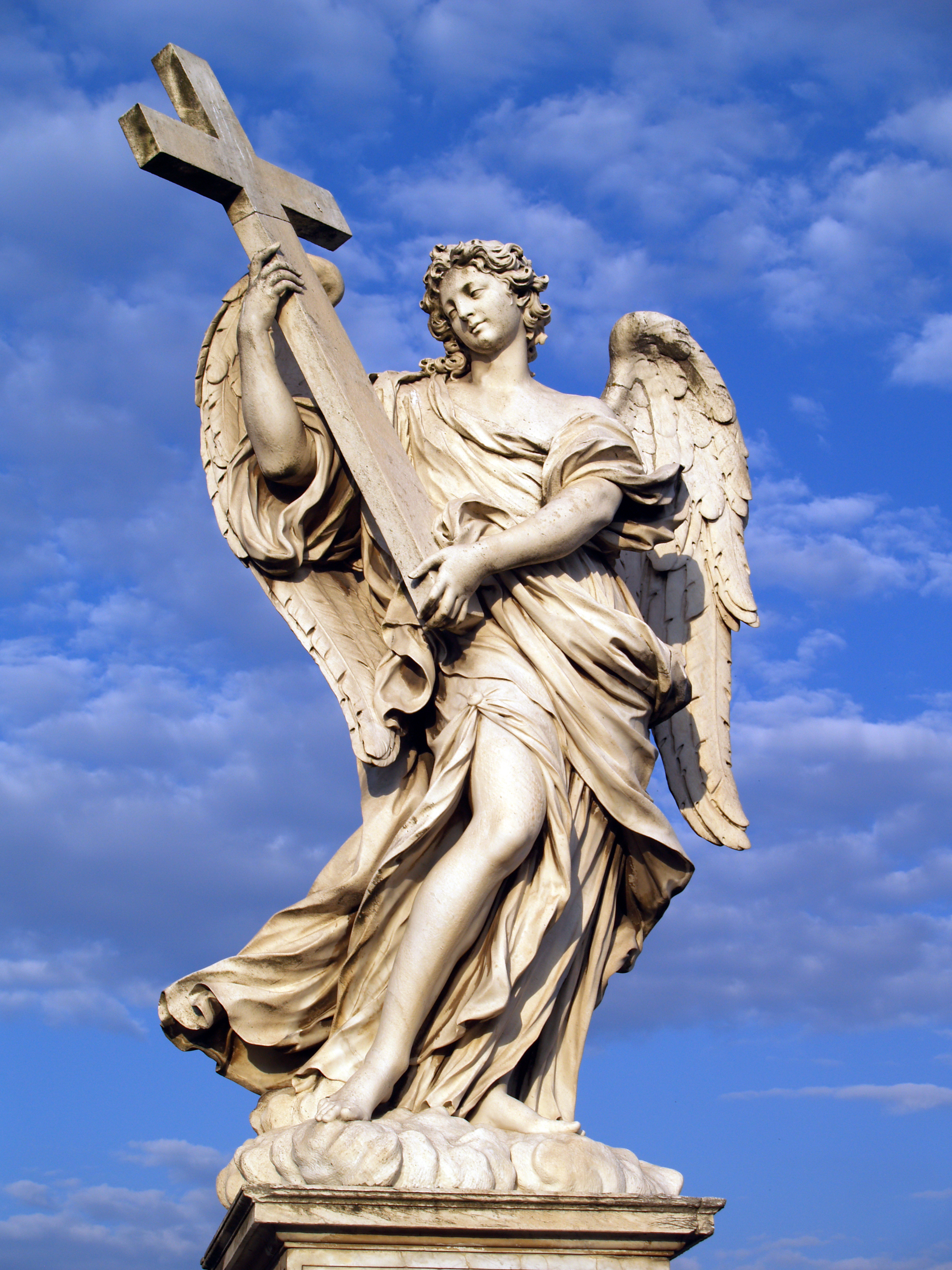 Roma. Ponte Sant'Angelo.